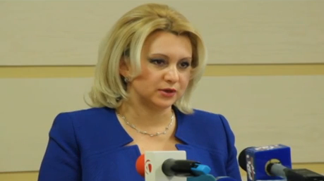 Violeta Ivanov